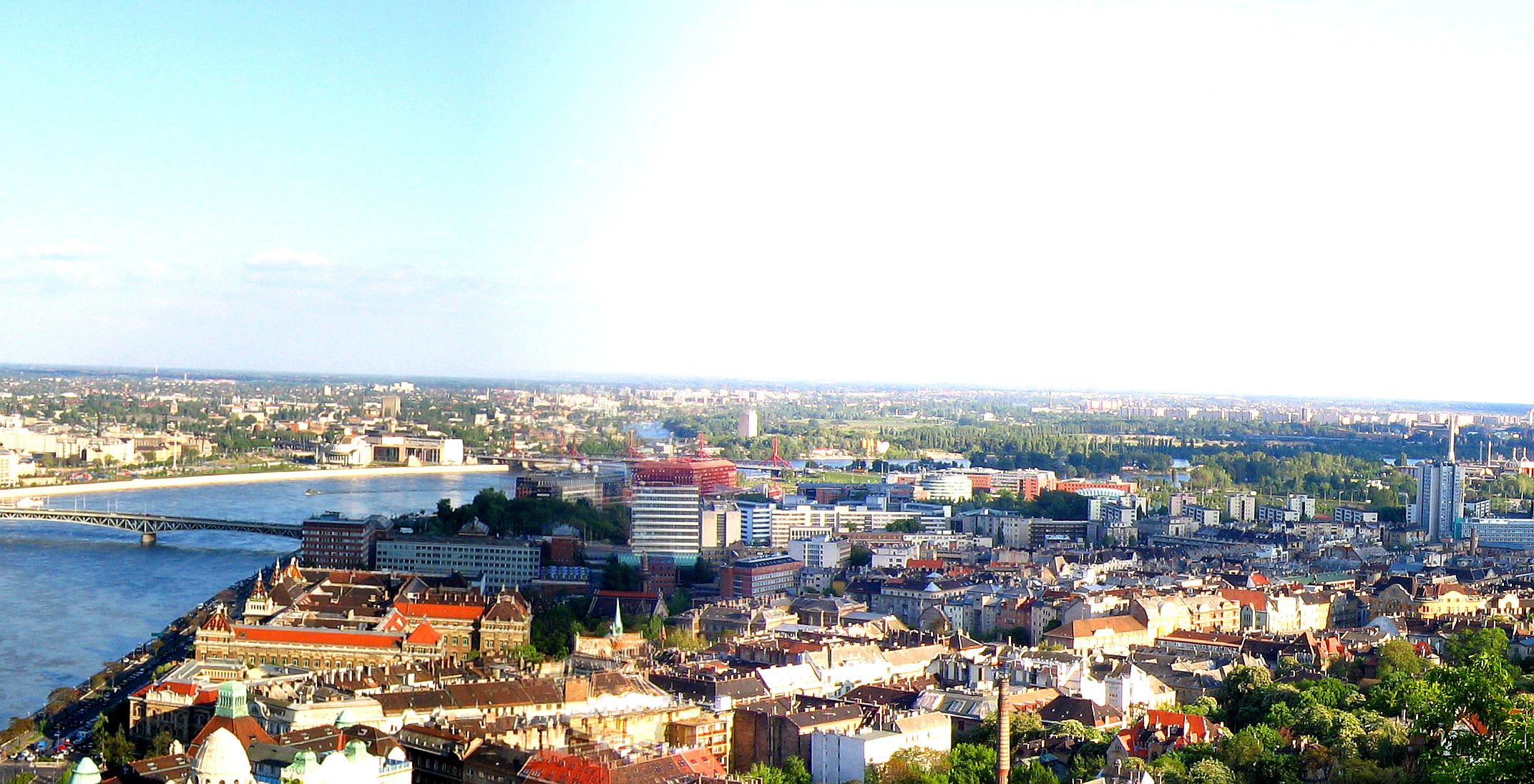 A Műegyetem épületegyüttesének látképe a Gellérthegyről, háttérben a Lágymányosi öböl és a Kopaszi-gát fáival